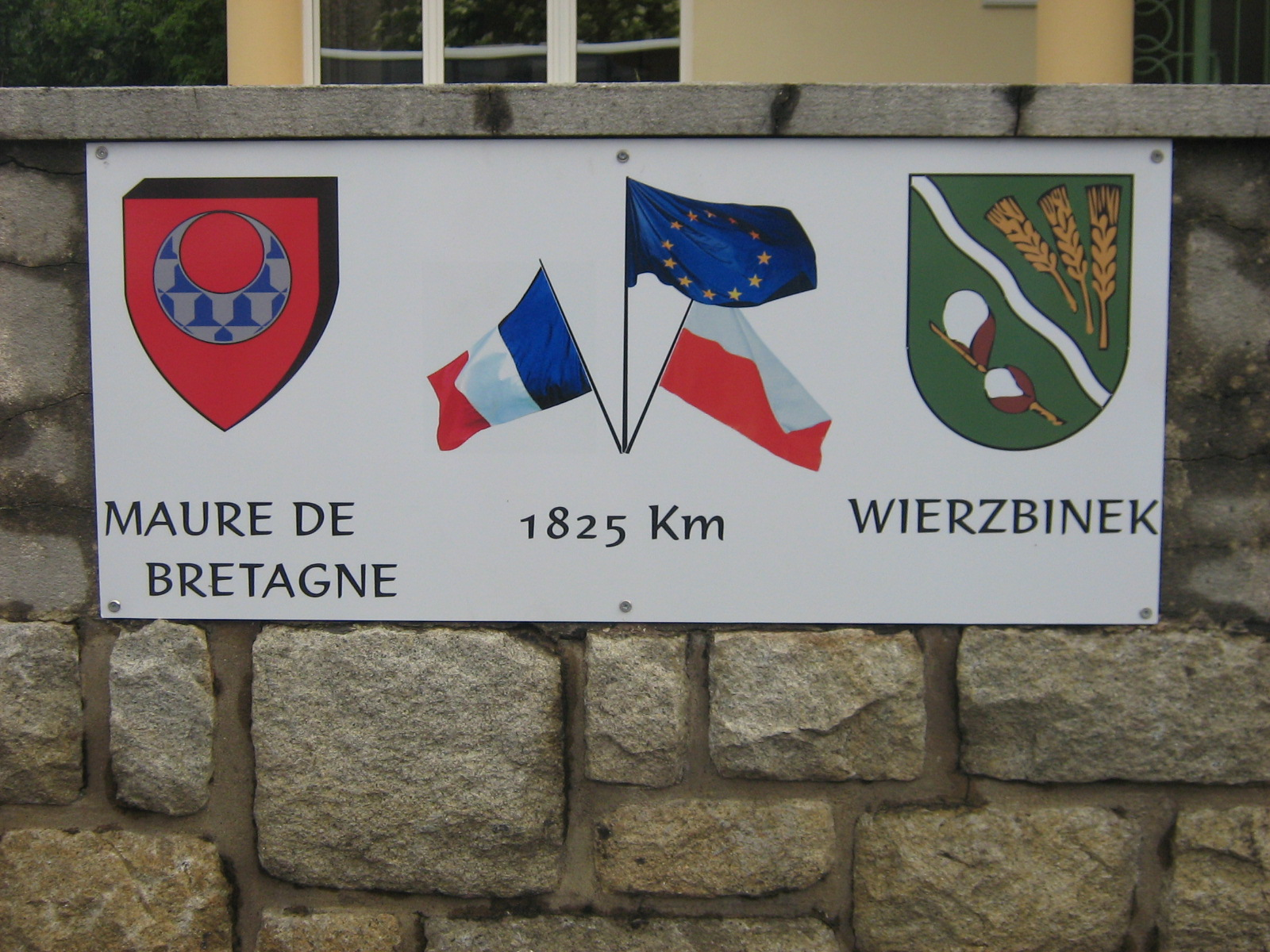 Herby gmin Maure-de-Bretagne i Wierzbinek